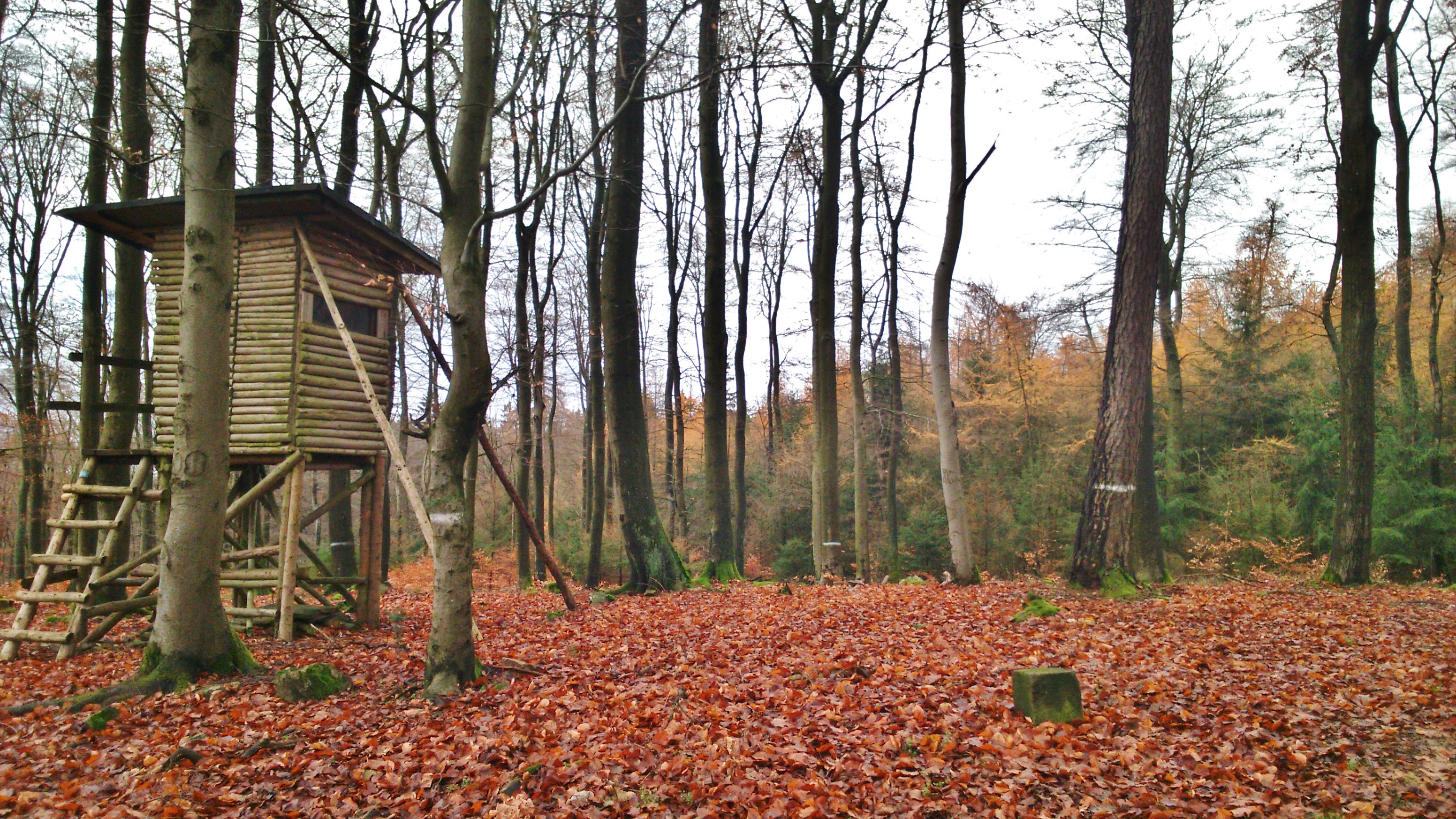 Gipfelstein auf dem Buchwaldskopf bei Oberjosbach im Taunus.